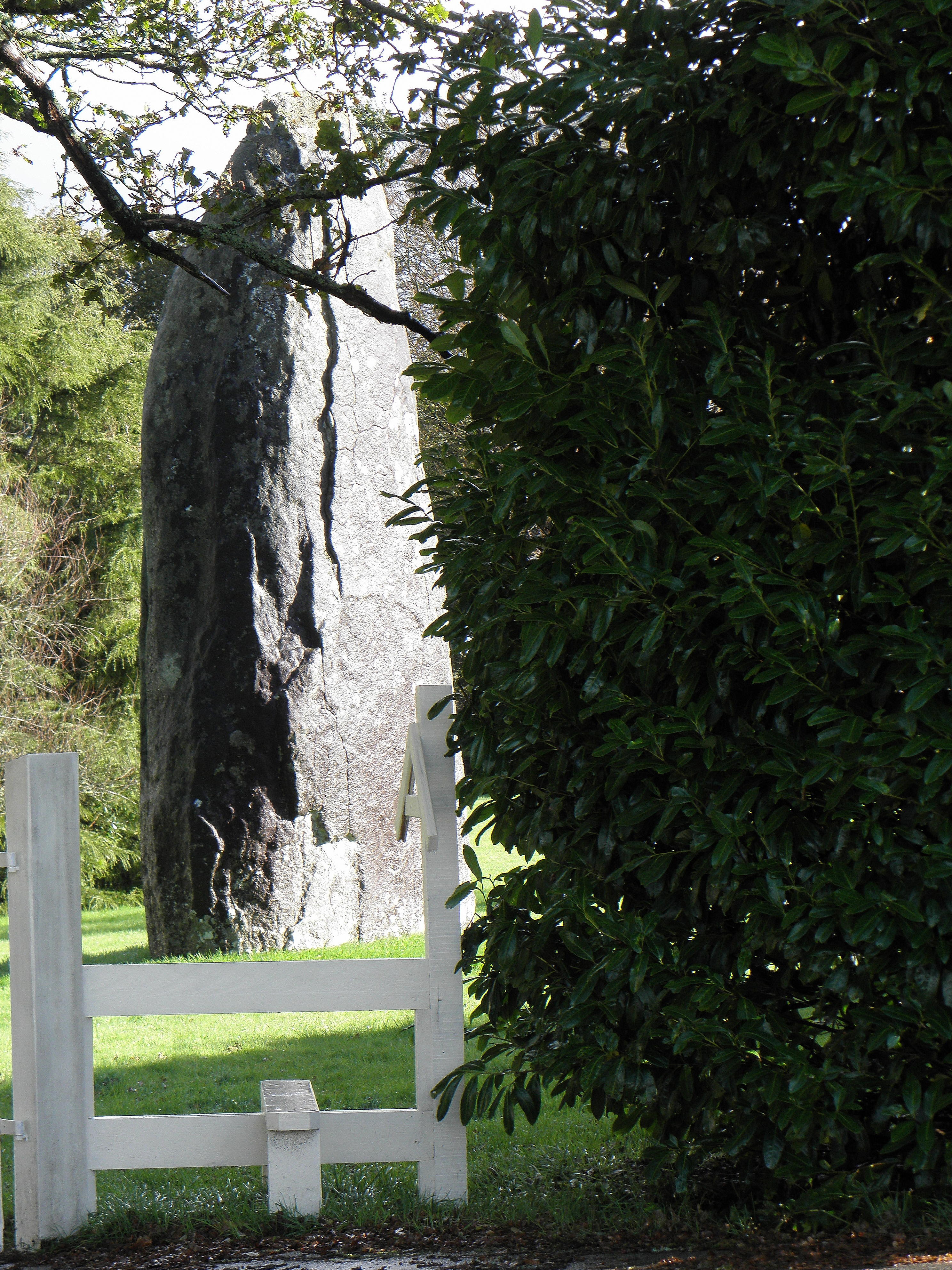 Le menhir du Cloître au Huelgoat (29).